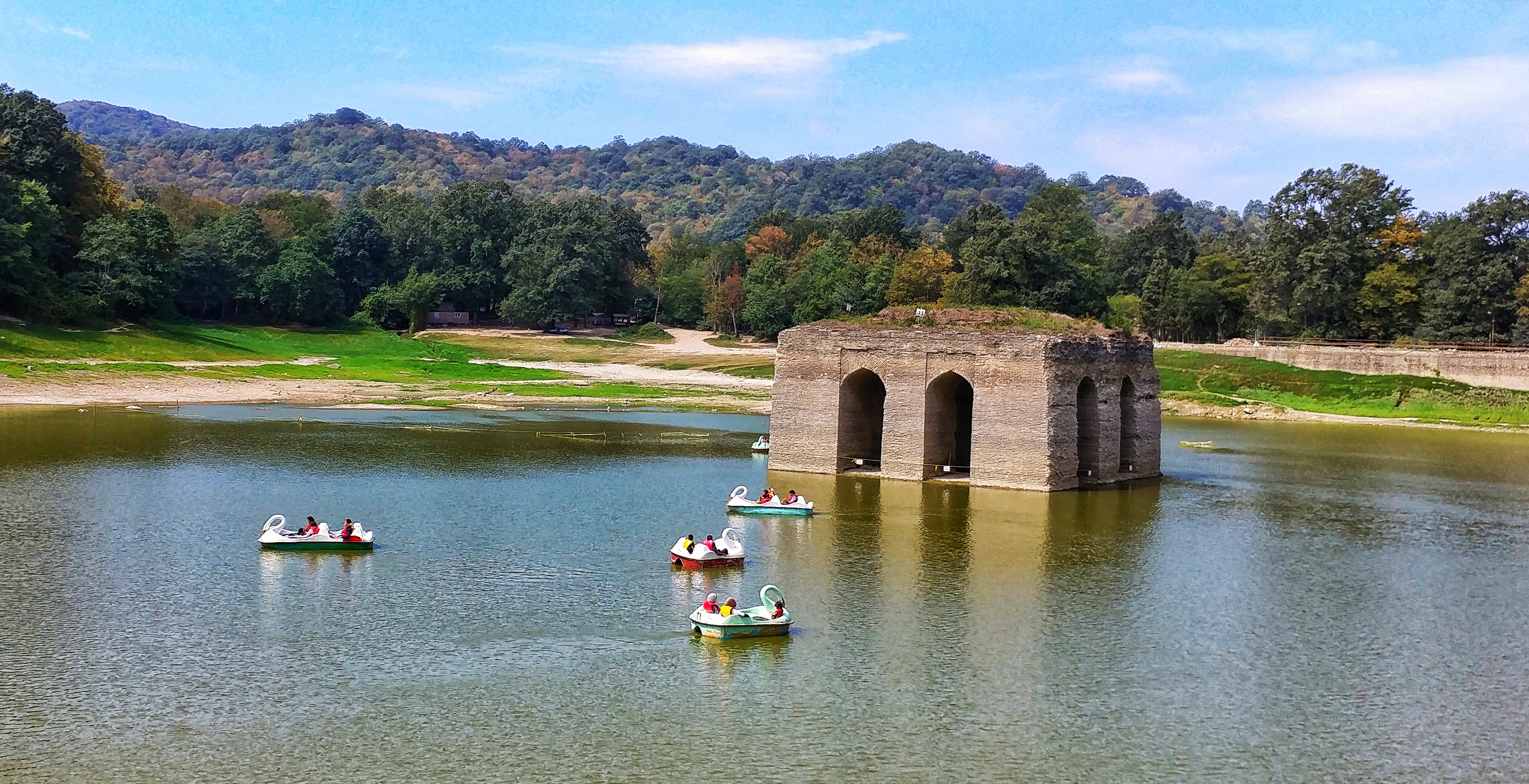 سازه ی دریاچه ی عباس آباد